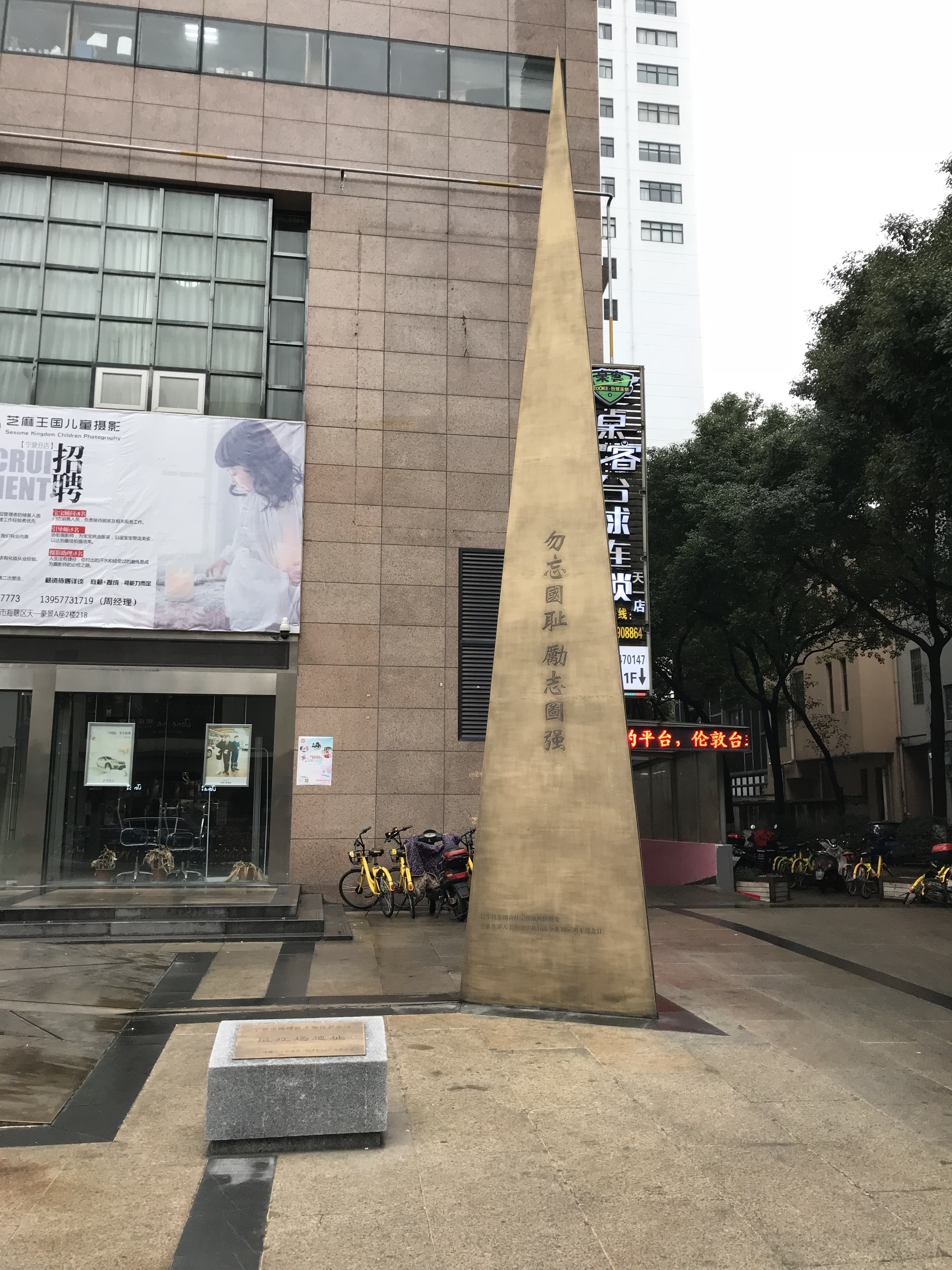 中文（中国大陆）: 中国浙江省宁波市海曙区鼠疫场遗址